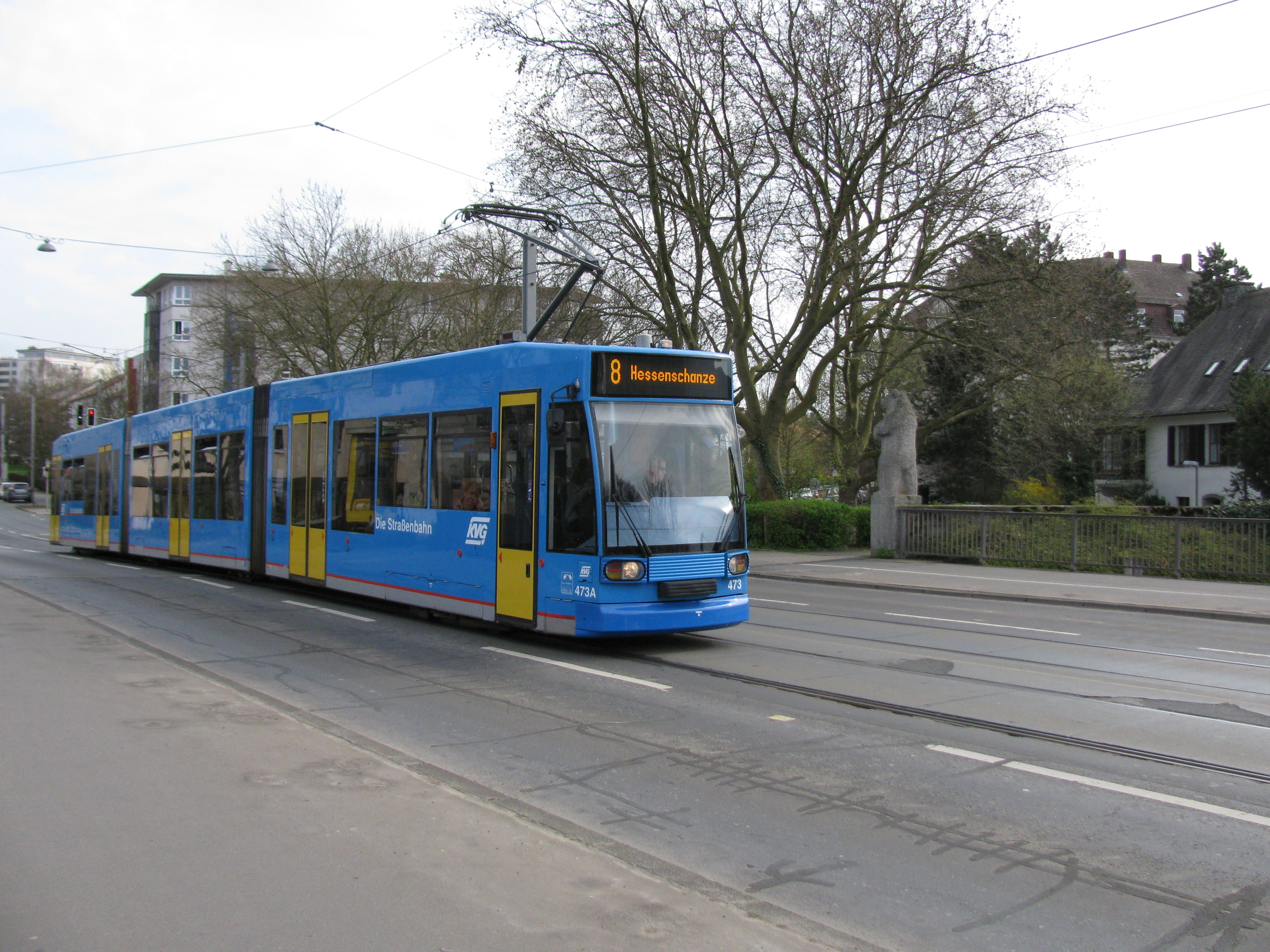 die Straßenbahn 473 der Kasseler Verkehrsgesellschaft passiert die Berliner Brücke in Richtung Hessenschanze